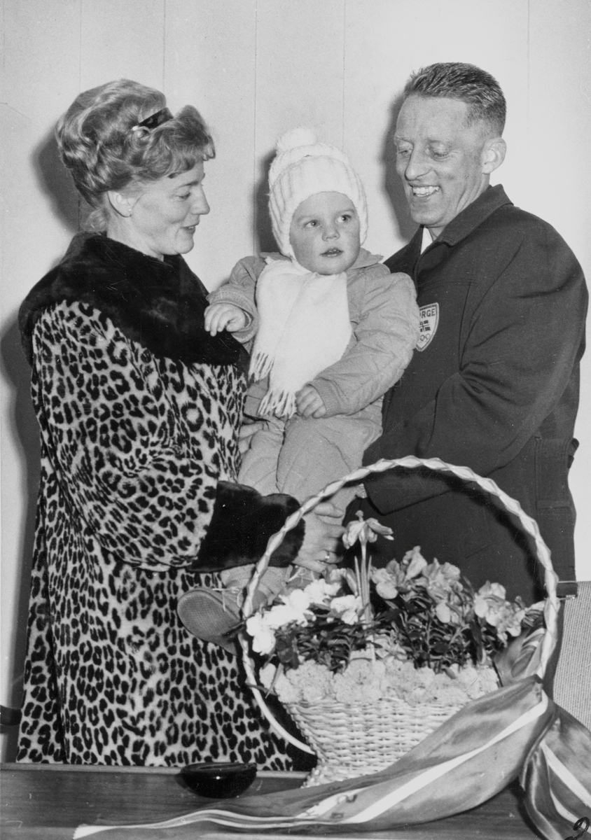 ”Gullguttens hjemkomst 9.2.1964.” Olga, Audun og Tormod Knutsen.